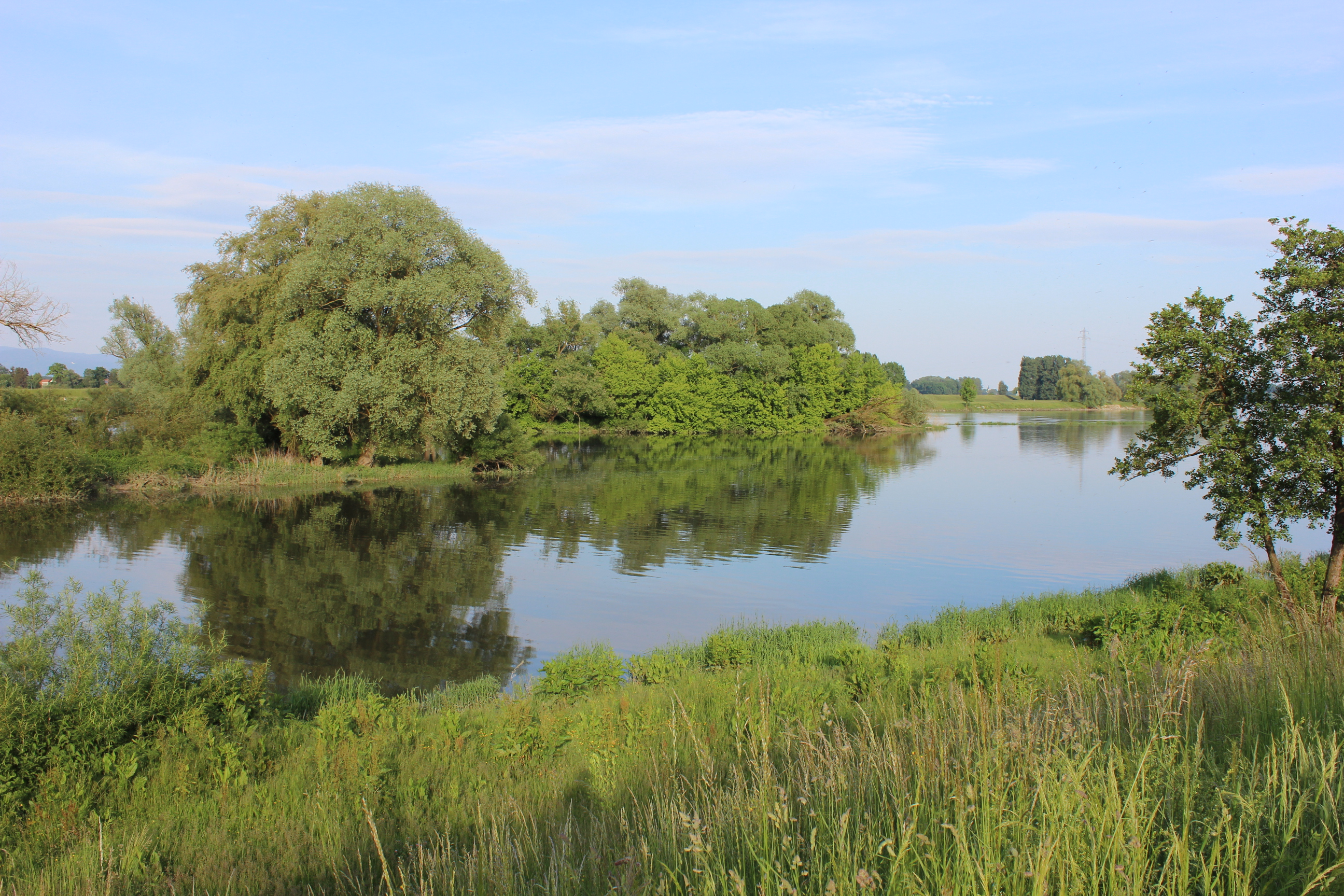 Das Donau-Ufer in Irlbach im Landkreis Straubing-Bogen. Der Prallhang der Donau gehört zur Liste der Geotope im Landkreis Straubing-Bogen und trägt die Nummer 278R002.